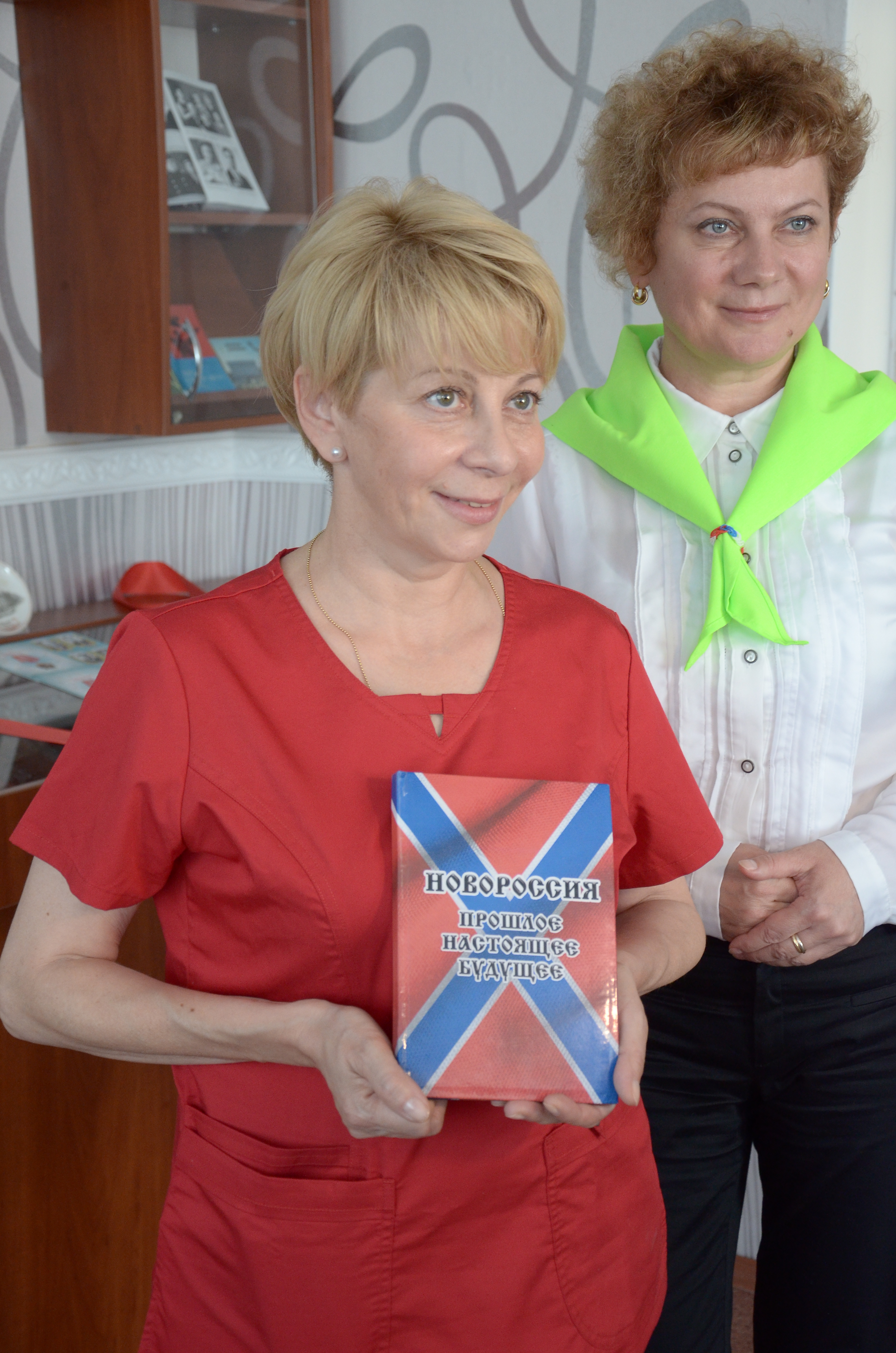 Первое сентября в общеобразовательной школе-интернате №1 города Донецка